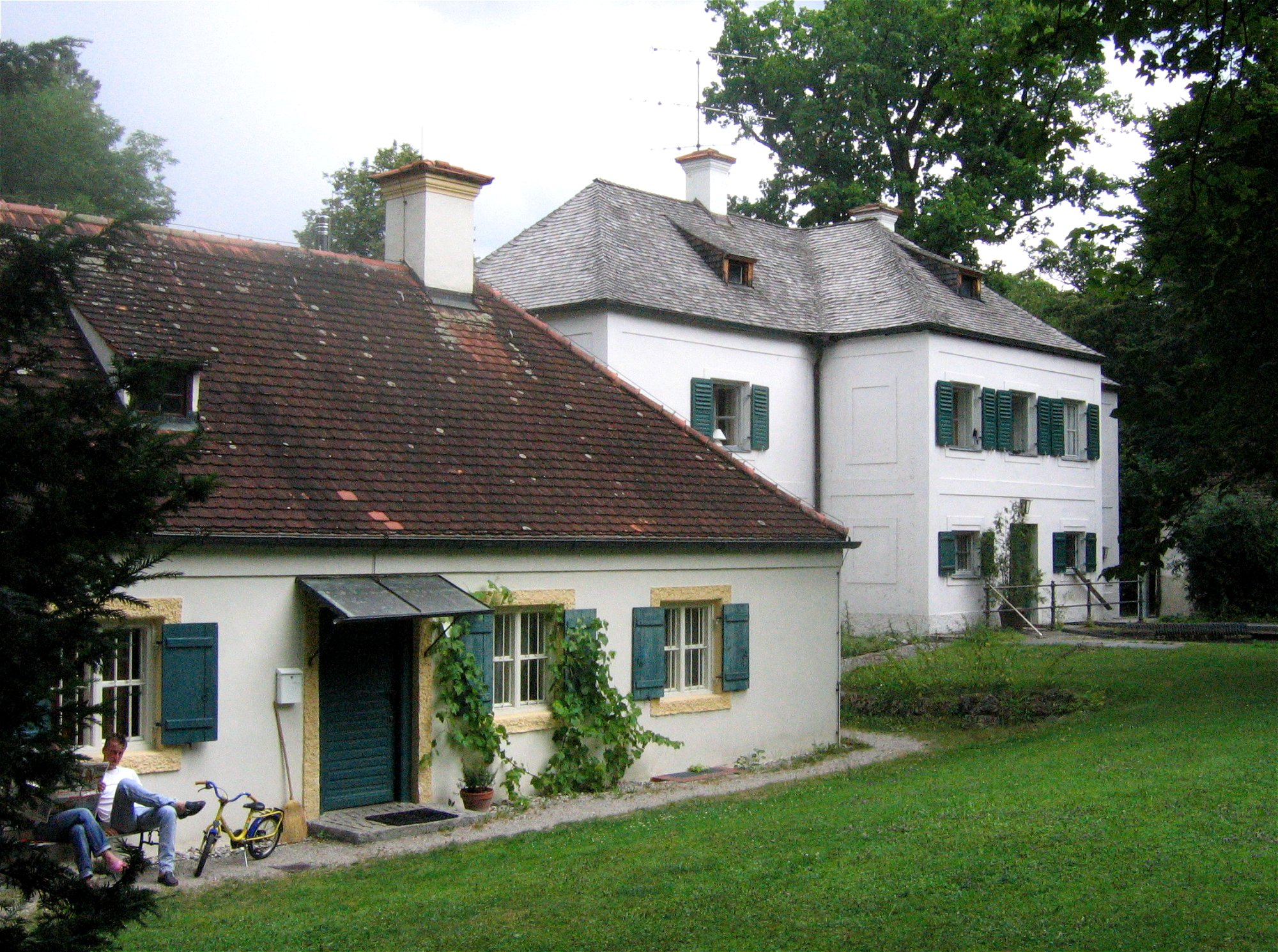 Das Dörfchen im Schlosspark Nymphenburg, München